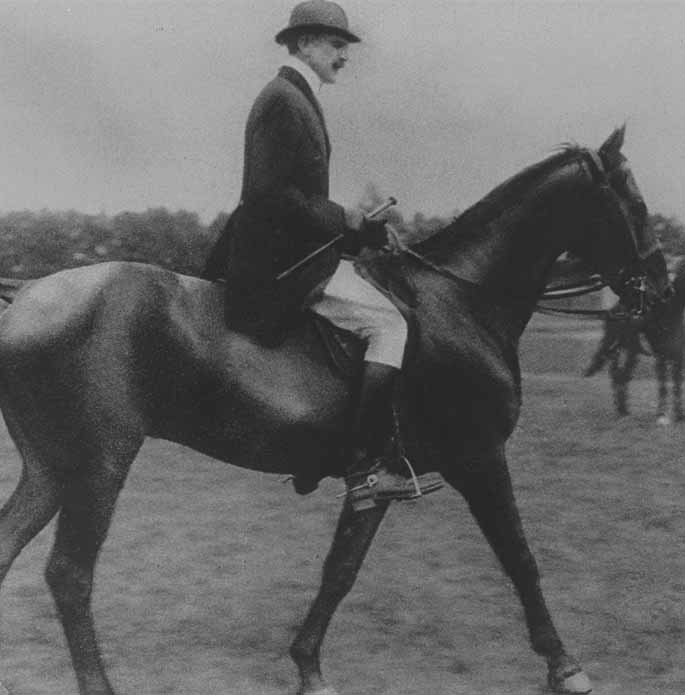 Ernst Linder, Paris Olympics